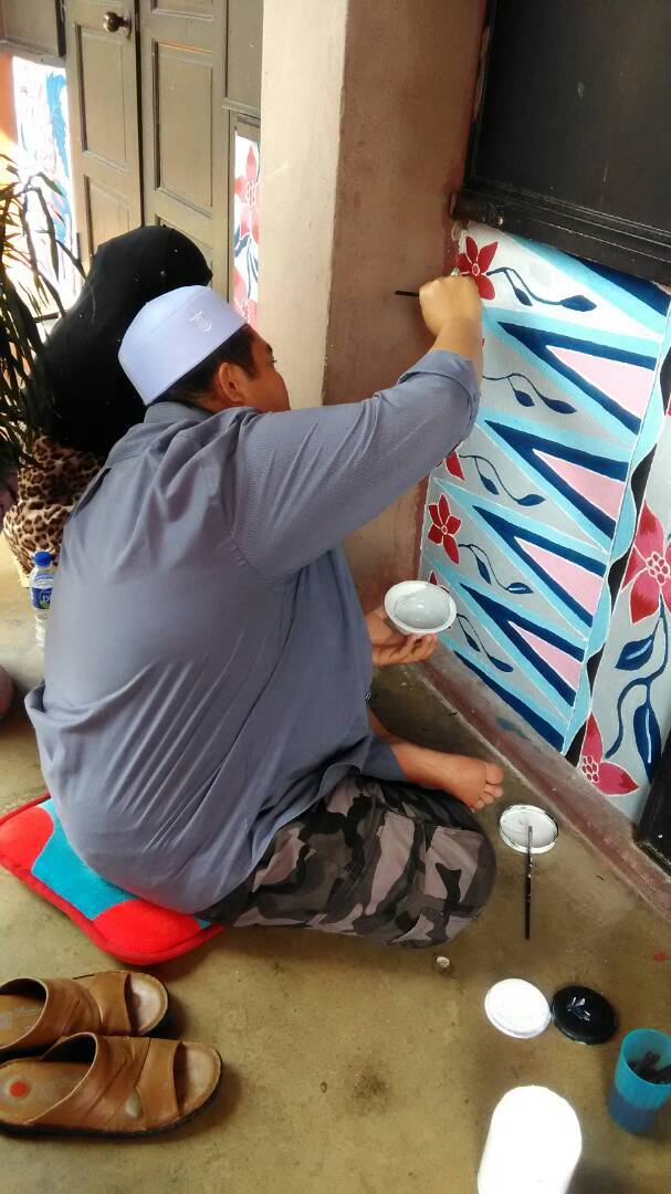 Dalam hati nak tambah bunga lagi katanya. Tu yang lukis bunga-bunga